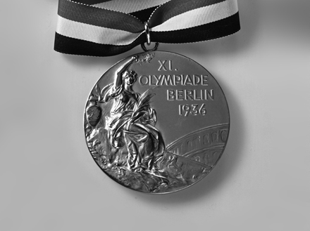 Olympische Sommerspiele 1936 – Goldmedaille von B.H. Mayer's